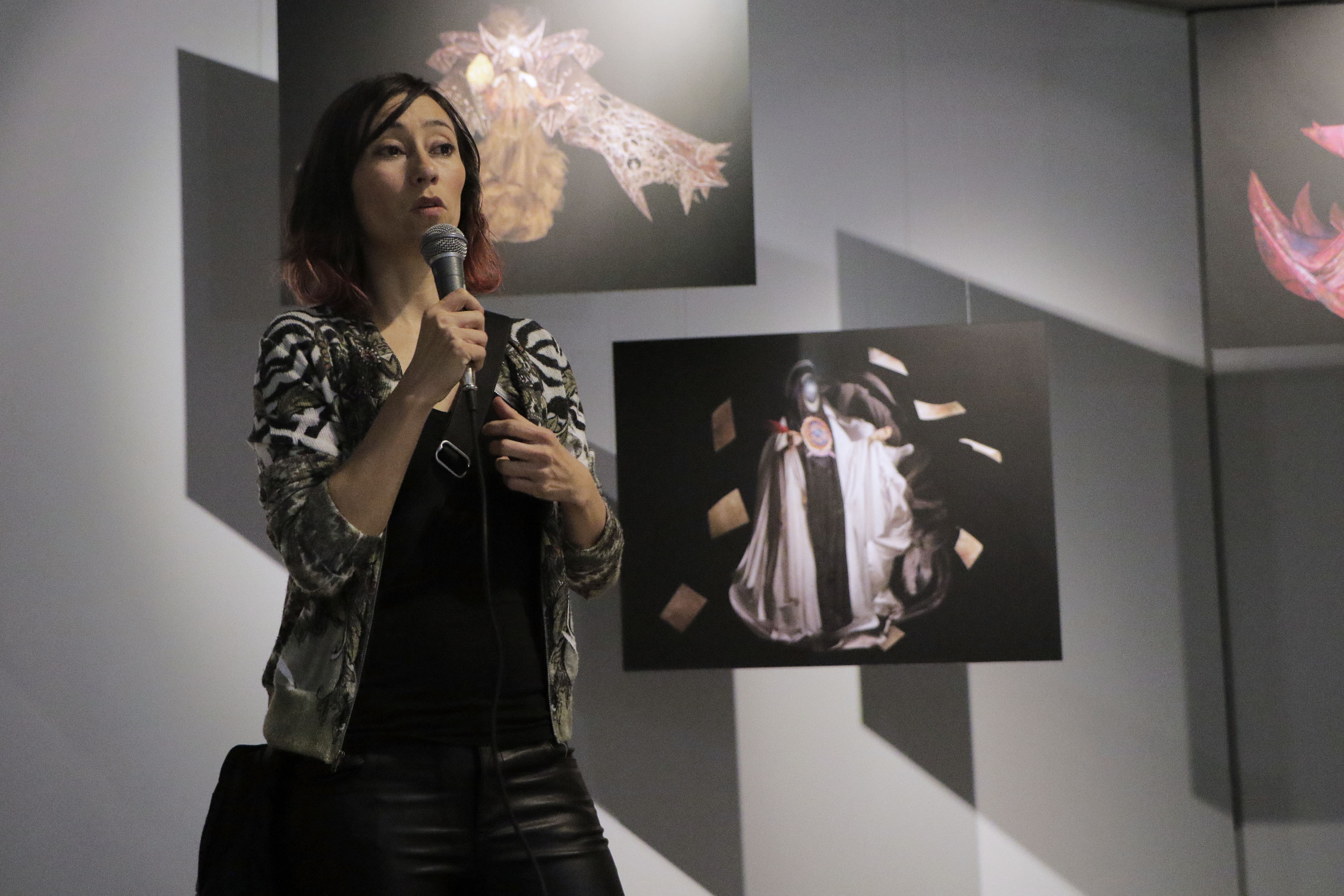 Jueves 8 de marzo Museo Nacional de la Revolución se conmemoró el Día Internacional de la Mujer con las siguientes actividades: Libro club revolución, Mujeres y literatura; Concierto de música de Medio Oriente con el grupo Baskhar, e inauguración de la Galería Media Luna con la muestra fotográfica Cazadora de astros con la presencia de Lizette Abraham Palma fotógrafa de la muestra Fotografía: Tania Victoria/ Secretaria de Cultura CDMX